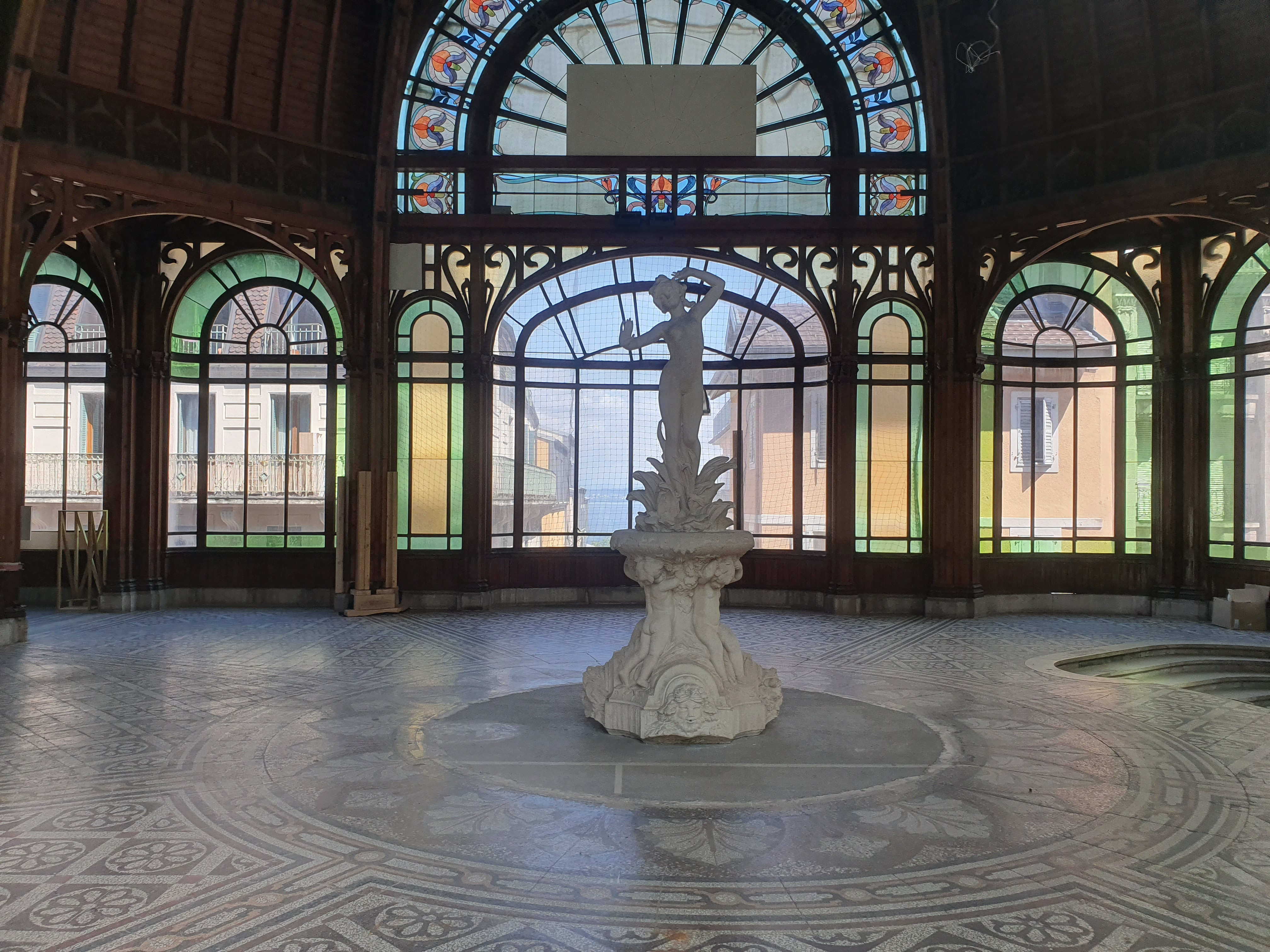 Evian - Buvette Cachat - Intérieur